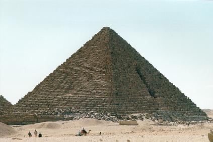 Pyramide van Mycerinus